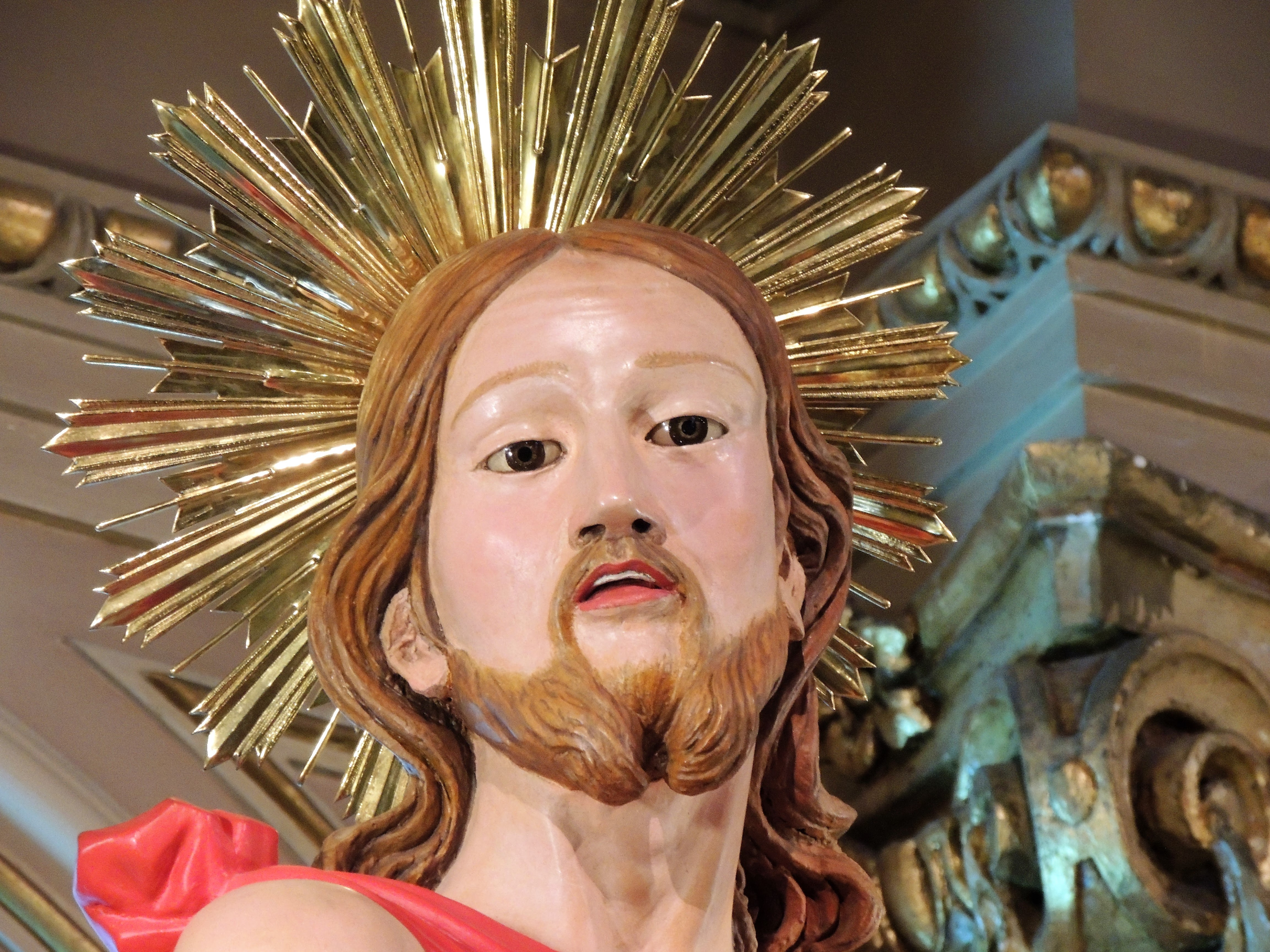 Il volto della statua lignea di San Giovanni Battista nella chiesa madre di Acitrezza